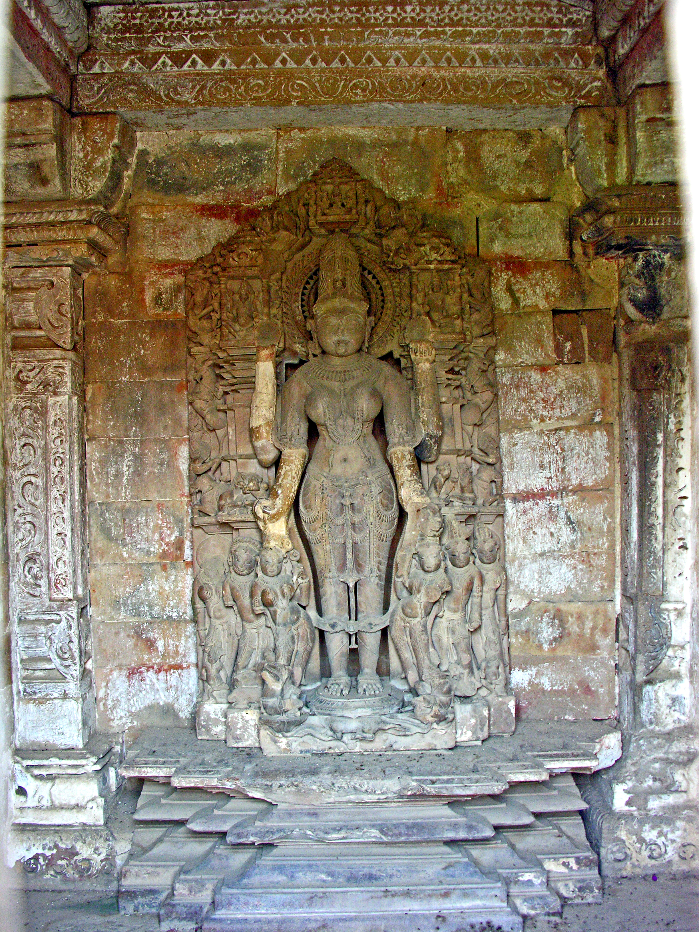 India-5728